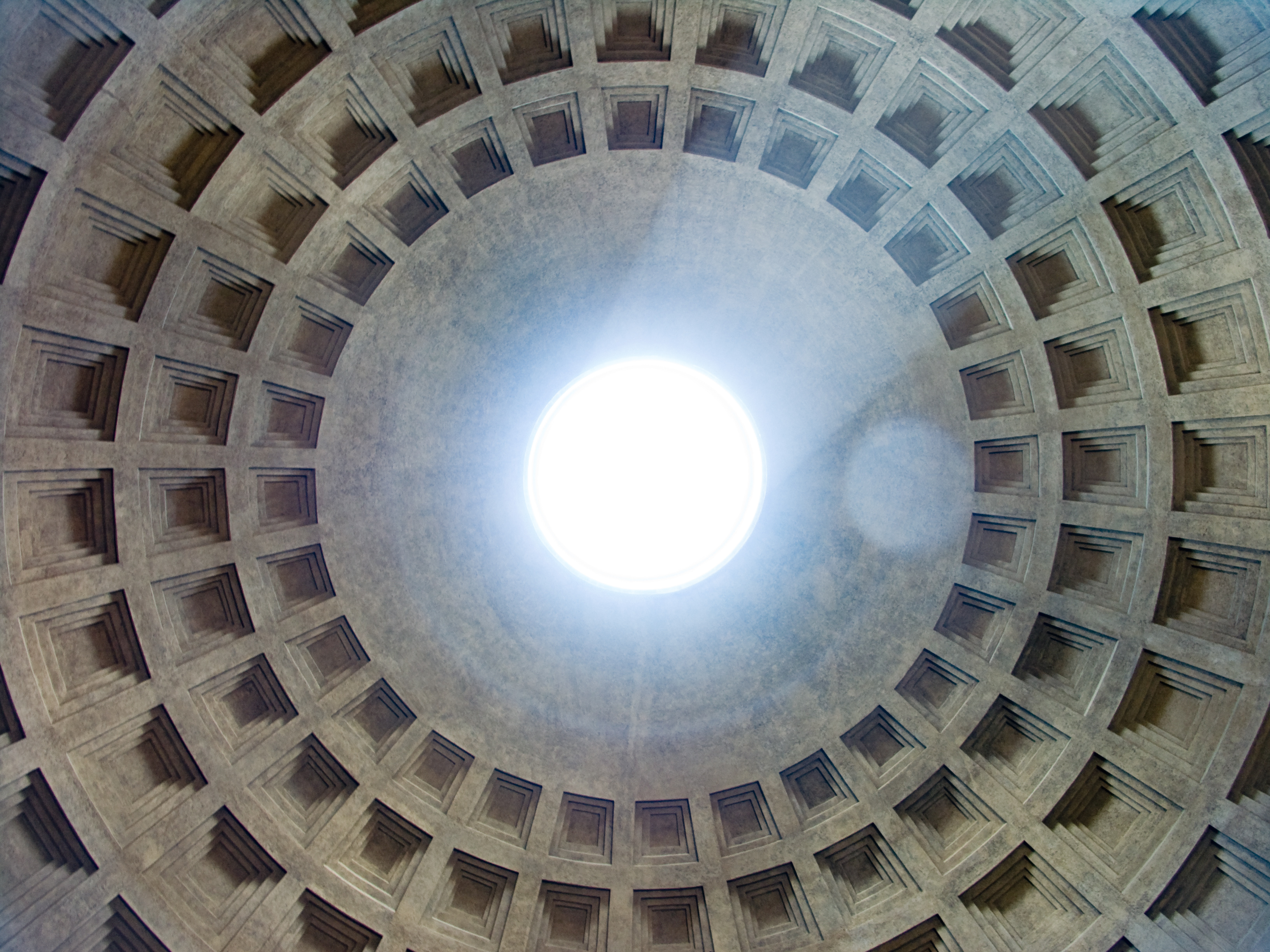 Vue du plafond en caisson du Pantheon à Rome